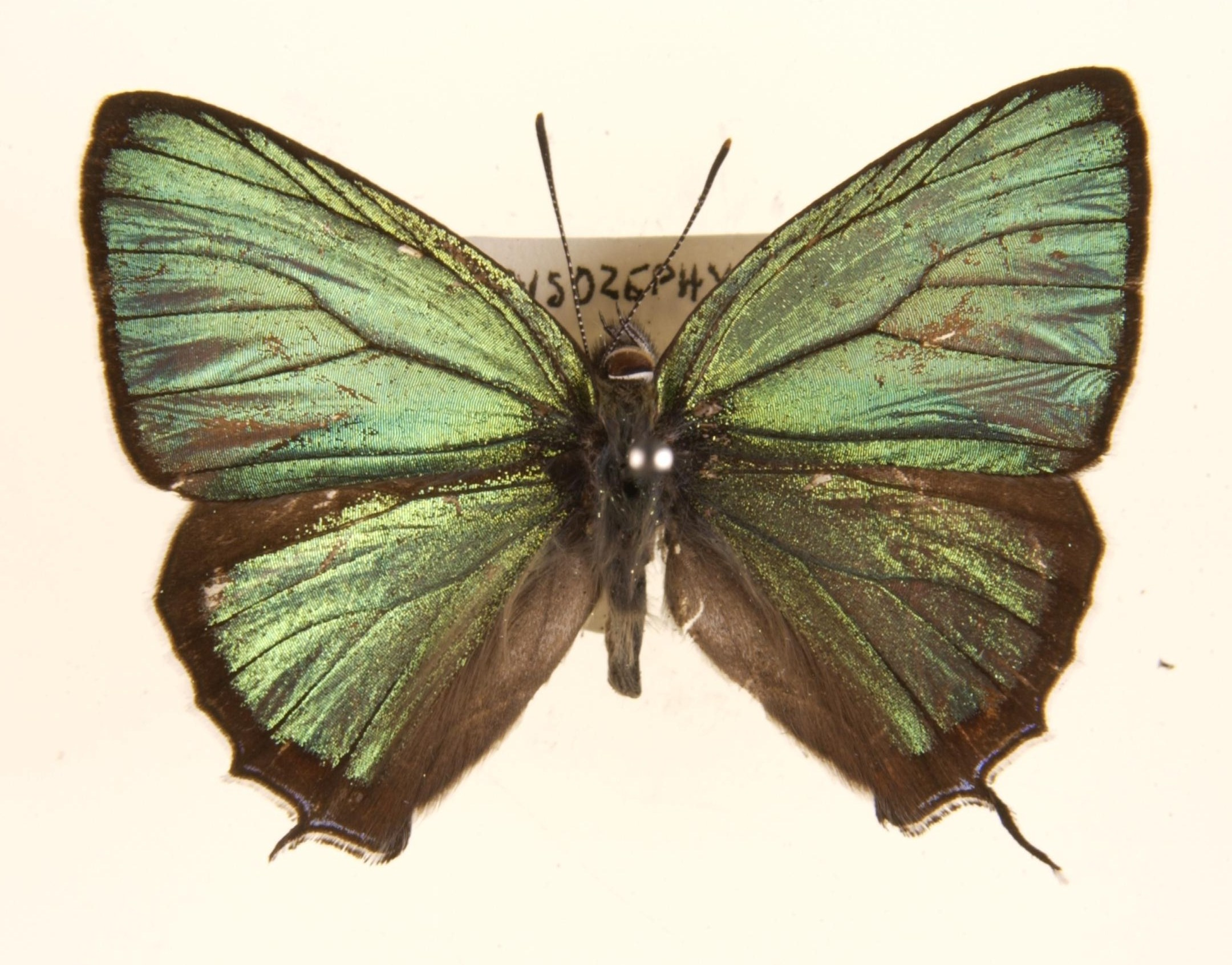 Chrysozephyrus nishikaze (Araki & Sibatani, 1941) Taiwan